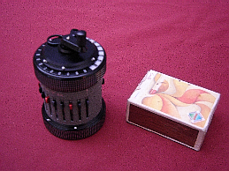 Calculatrice Curta, la boîte d'allumettes donne l'échelle